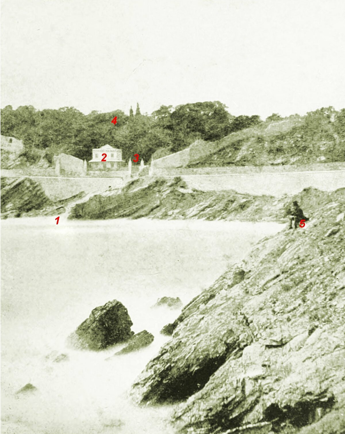 Fotografia dello scoglio di Quarto (Genova) da dove si imbarcarono i Mille di Garibaldi, scattata dal generale Stefano Canzio in data imprecisata, ma certamente compresa tra il 1861 e il 1869. I numeri in sovrapposizione indicano: 1. Varco tra gli scogli che servì da approdo per i barconi di collegamento alle navi "Piemonte" e "Lombardo"2. Villa Spinola3. Accesso al mare di Villa Spinola da dove uscirono i Mille4. Folta vegetazione del parco che precludeva la vista dalla strada5. Lo storico garibaldino Augusto Vecchi, proprietario di Villa Spinola e amico personale di Garibaldi